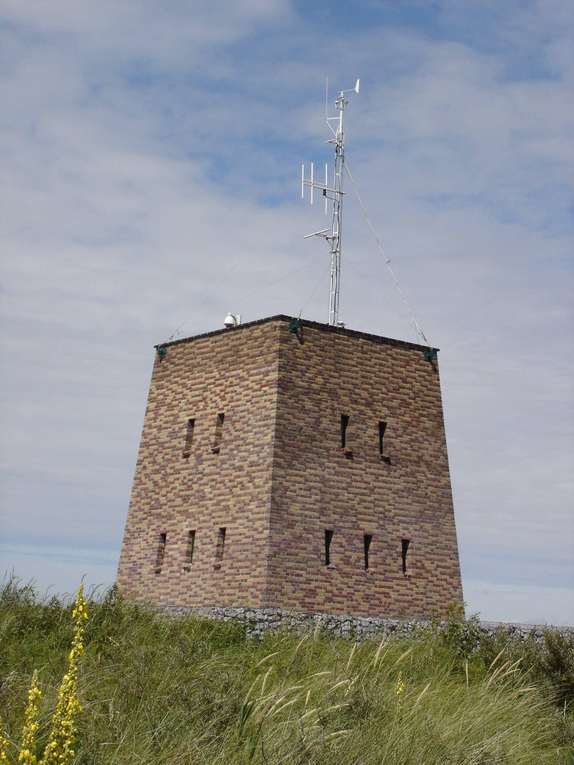 Luchtwachttoren Scheveningen, Zwarte Pad